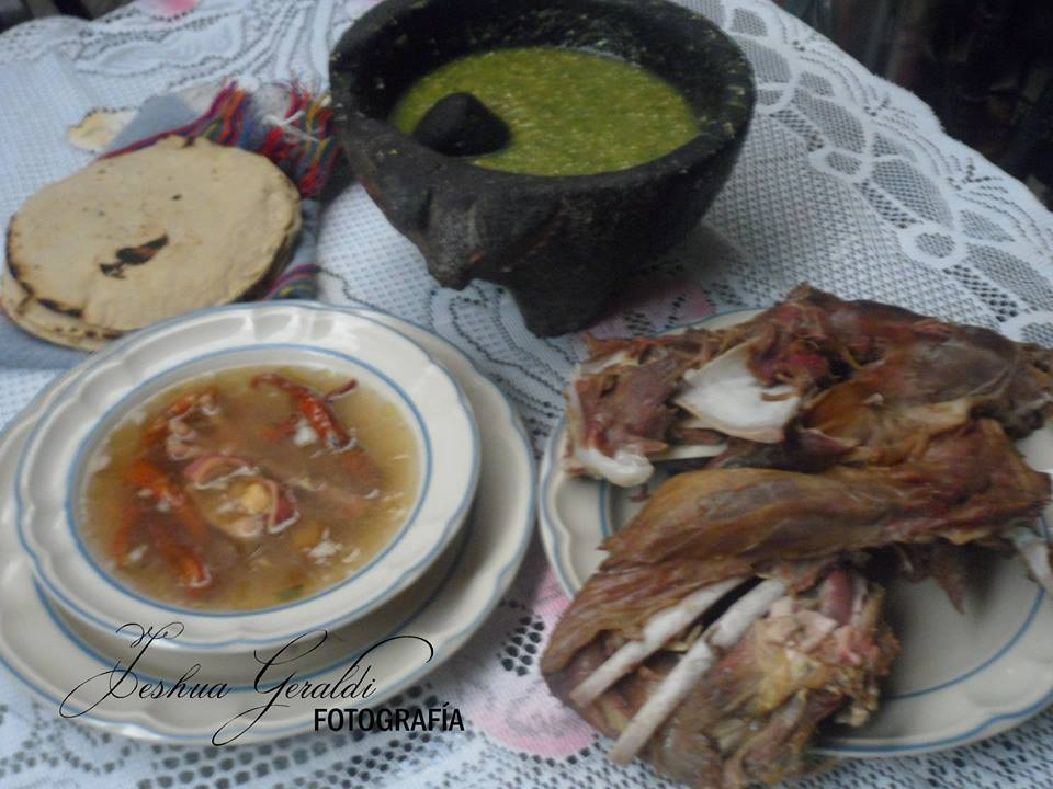 La barbacoa de borrego, así como el consomé, son un platillo tradicional de la gastronomía, no sólo de Palmarito Tochapán, sino de todo el centro del país, que se han convertido en el menú más popular de las bodas, fiestas y reuniones a las que los invitados nunca pueden dejar de faltar.